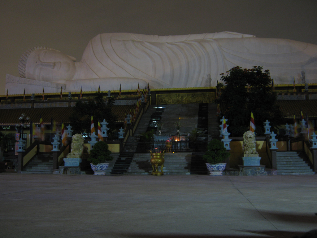 Tuong Phat nhap niet ban